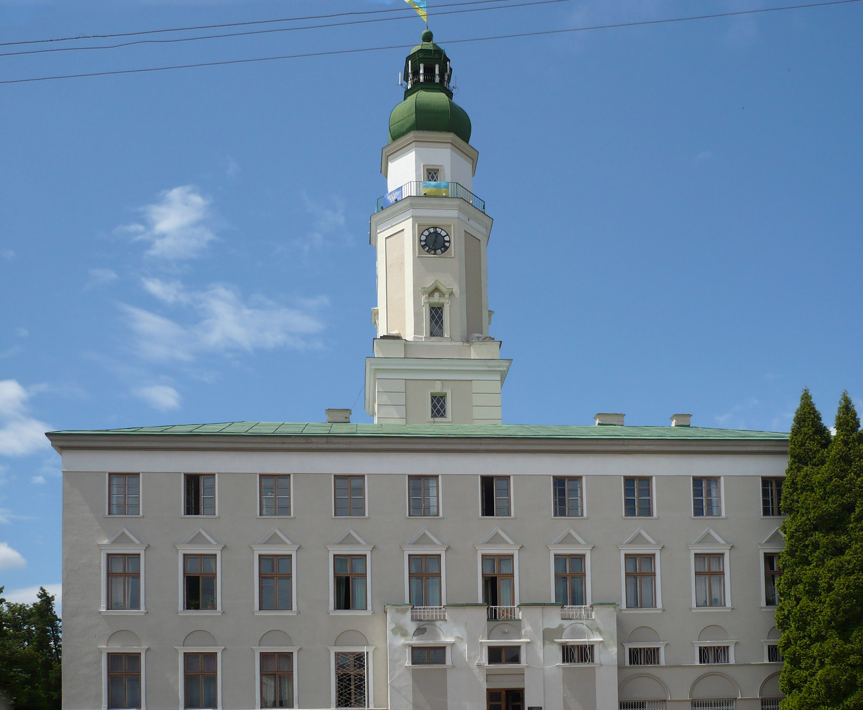 Ratusz